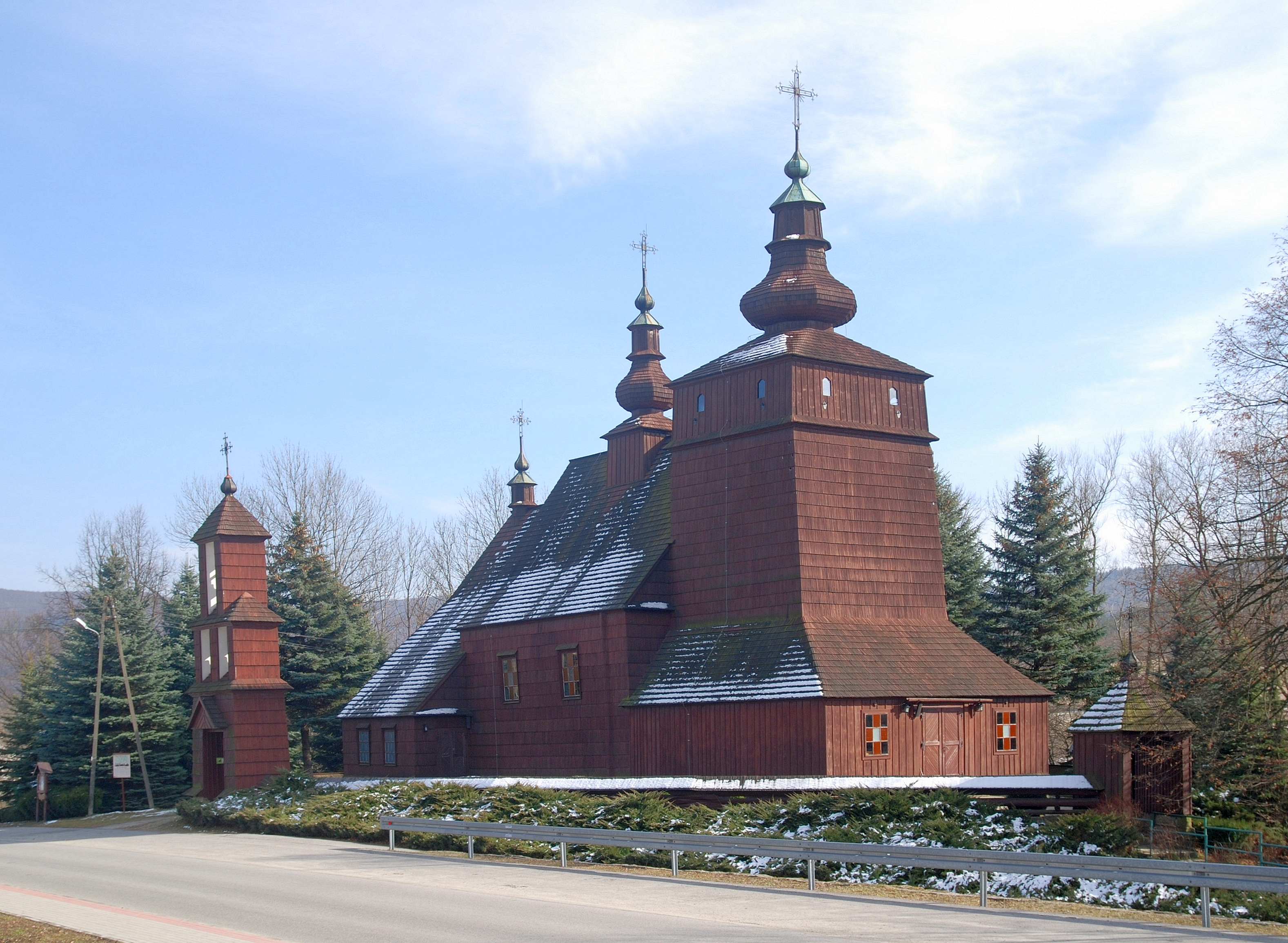 wieś Męcina Wielka Wikidata has entry Q3208428 with data related to this item.